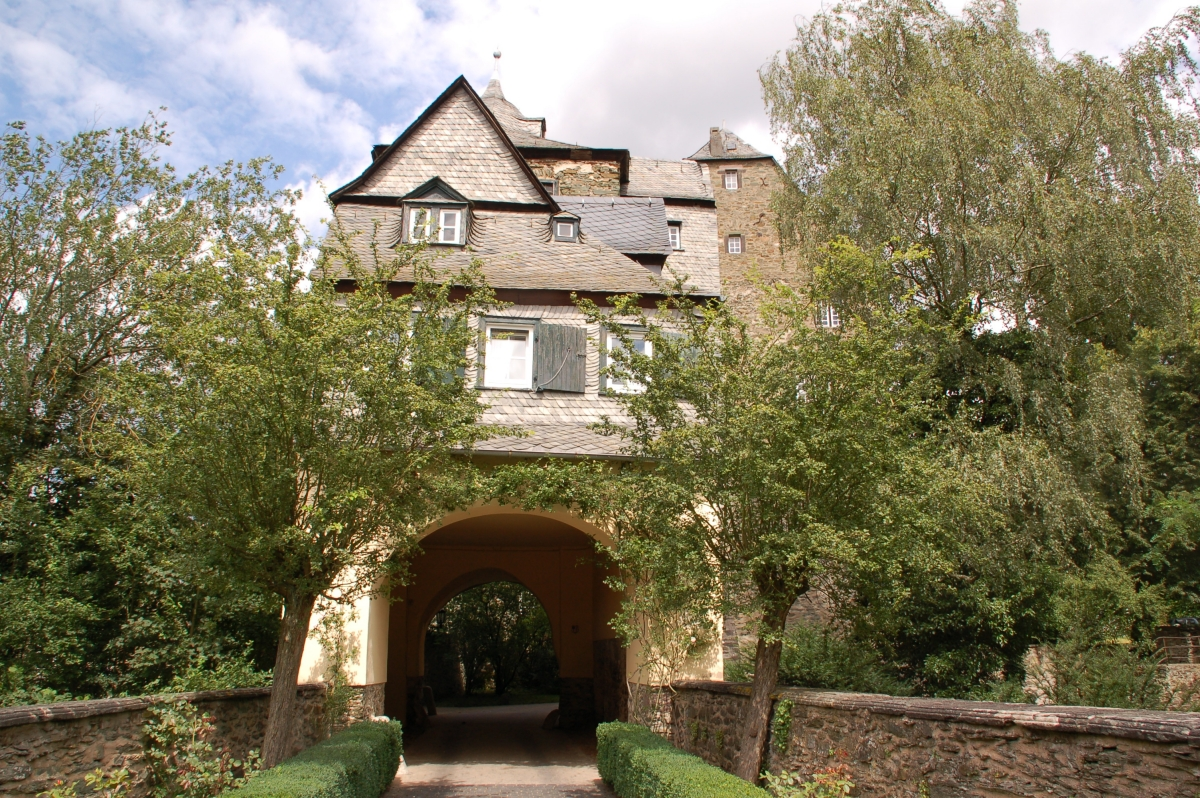 Burg Runkel, Runkel (Lahn), Hessen, Deutschland